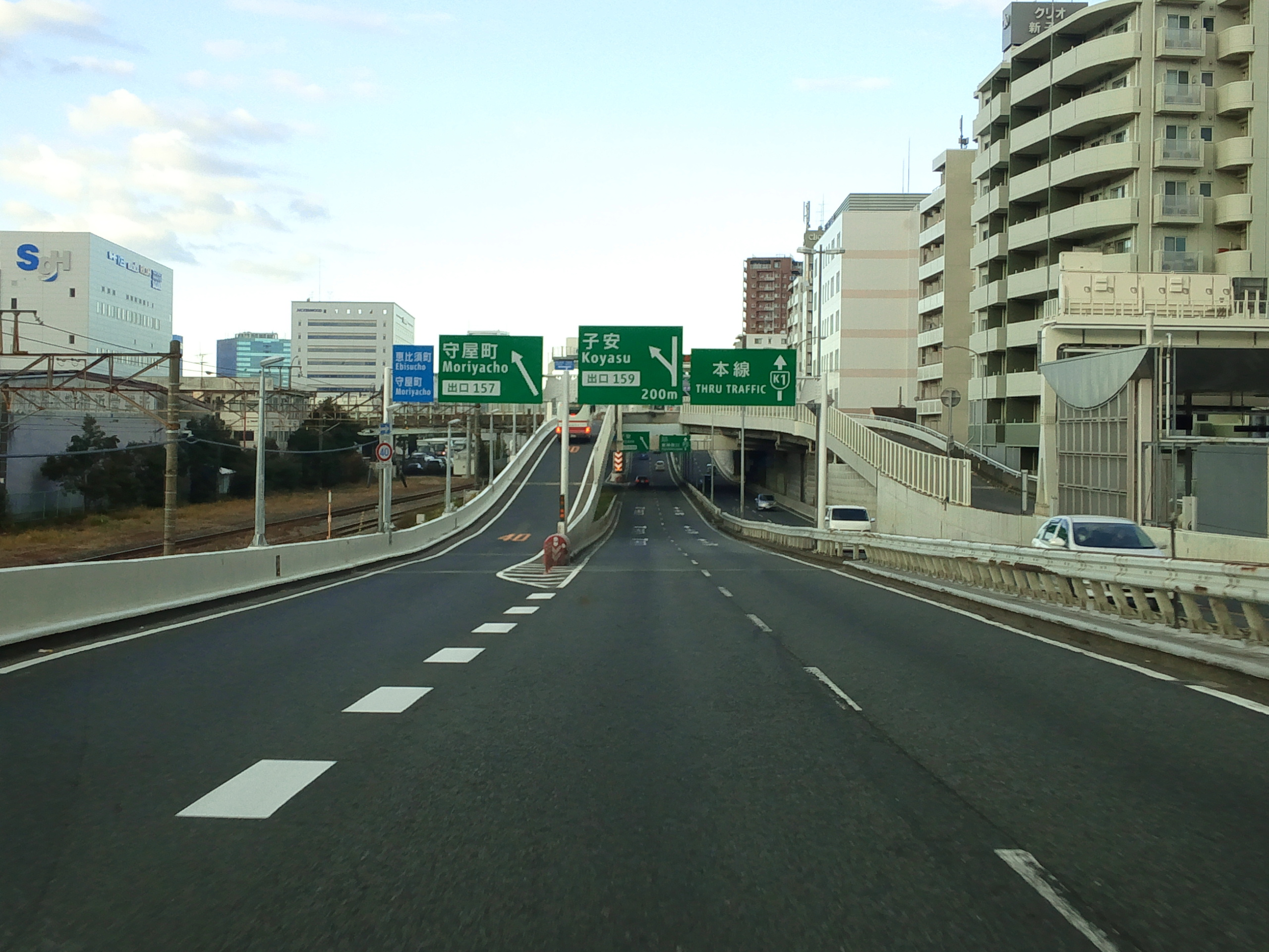 首都高速道路神奈川1号横羽線守屋町出口付近（金港JCT方面側出口）